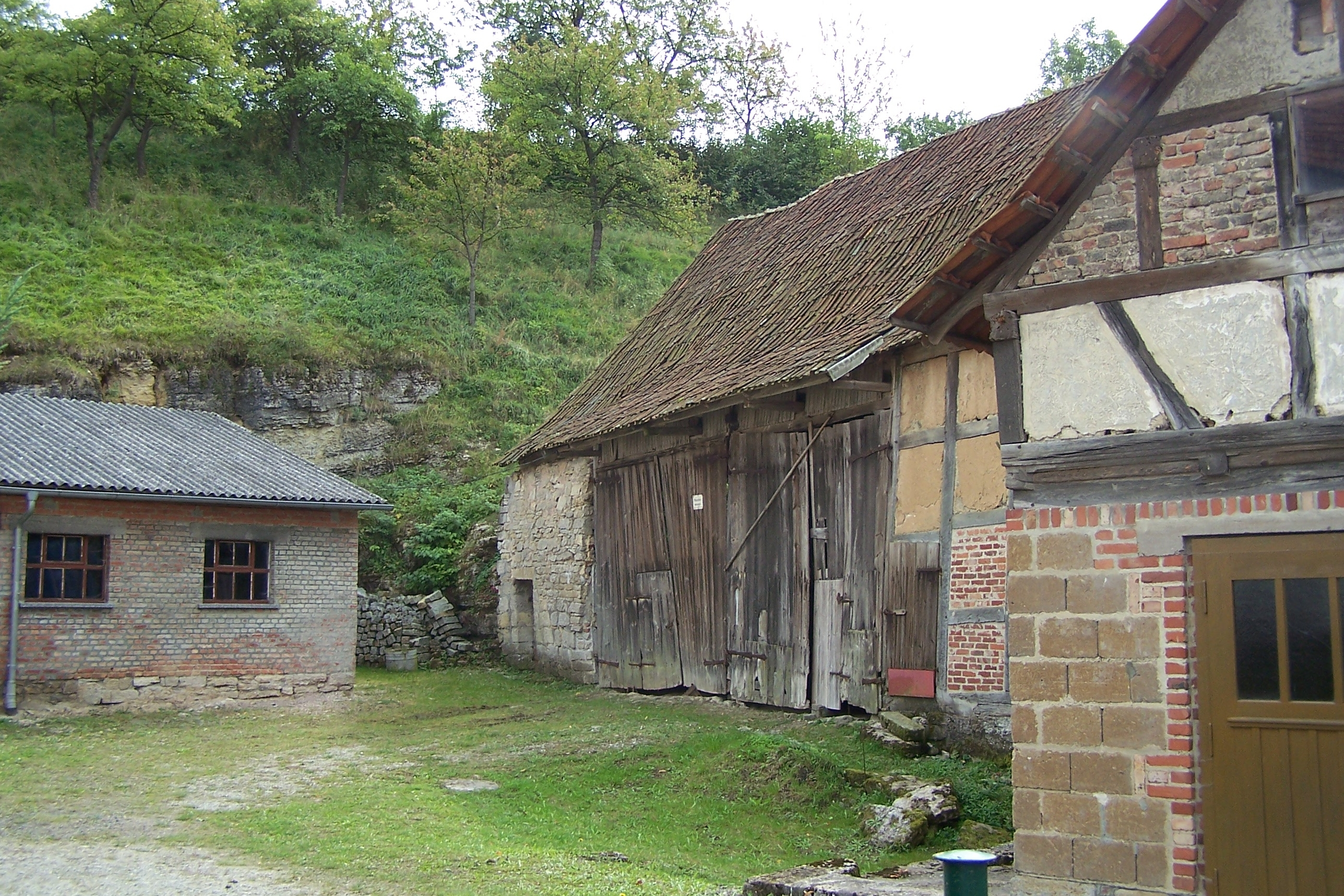 Gerstengrund